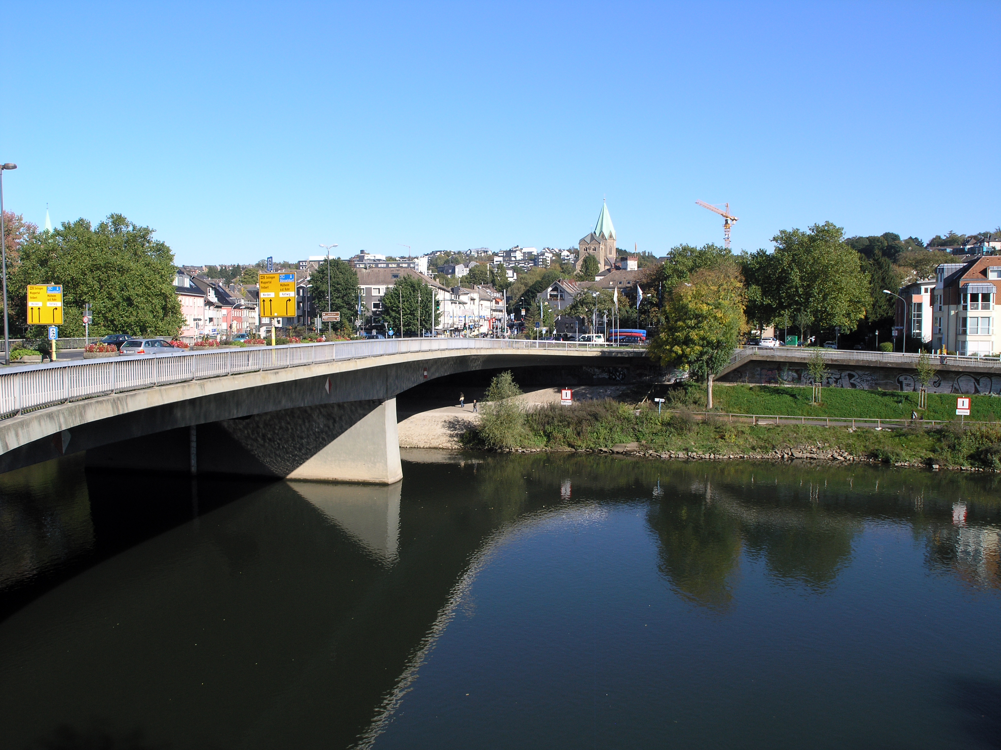 Северный Рейн - Вестфалия, Эссен - Верденский мост